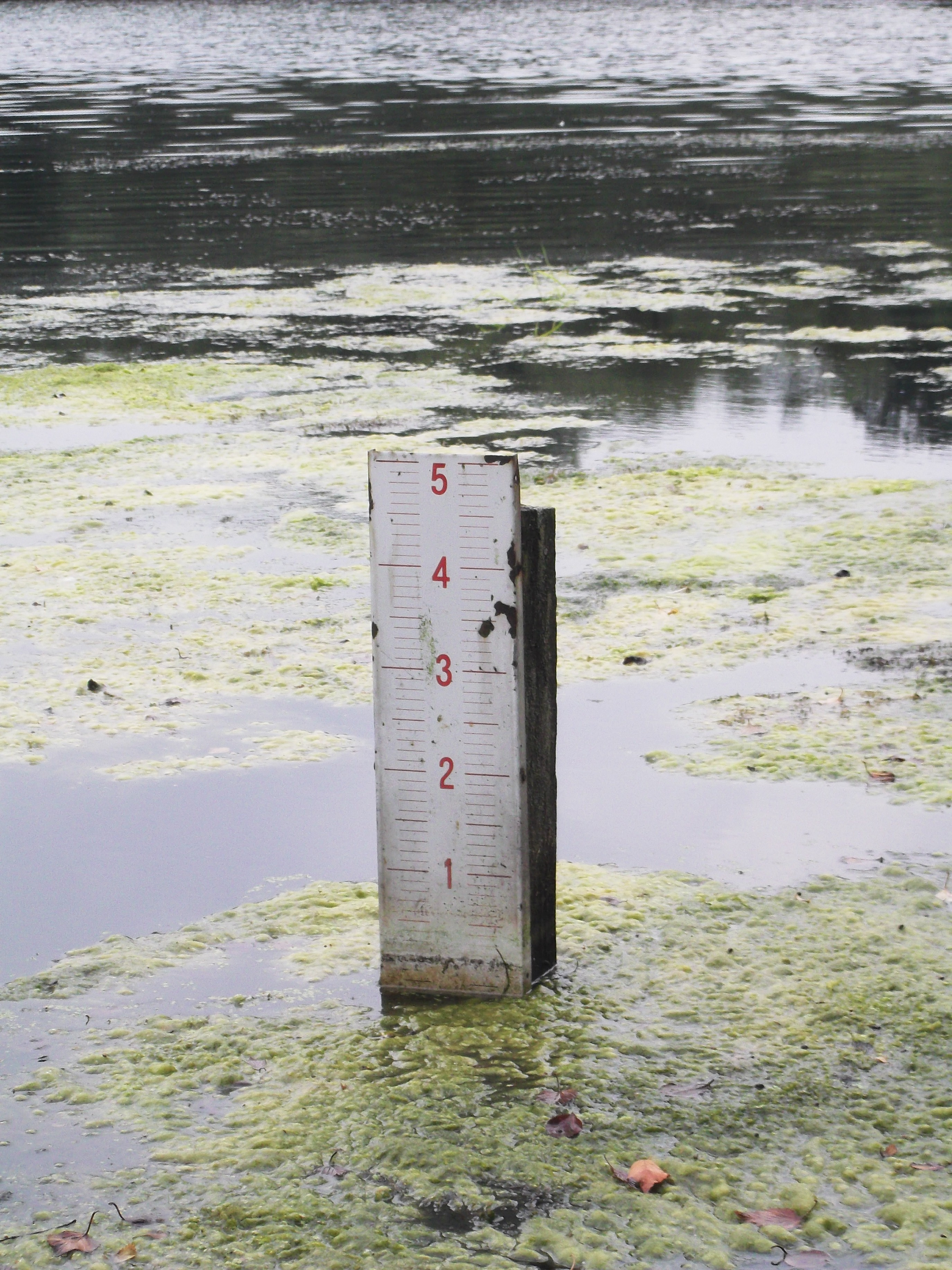 Vandstandspæl i Brede Mølledam